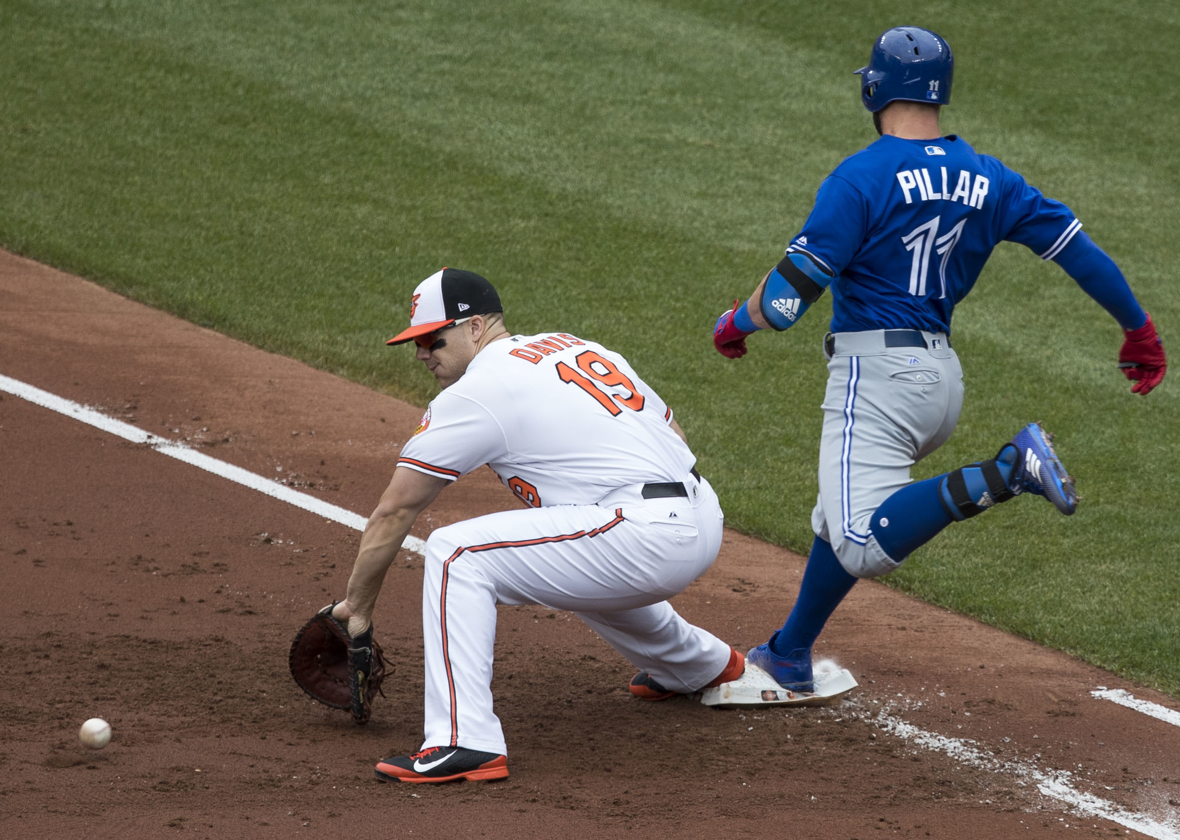 Blue Jays at Orioles 5/21/17